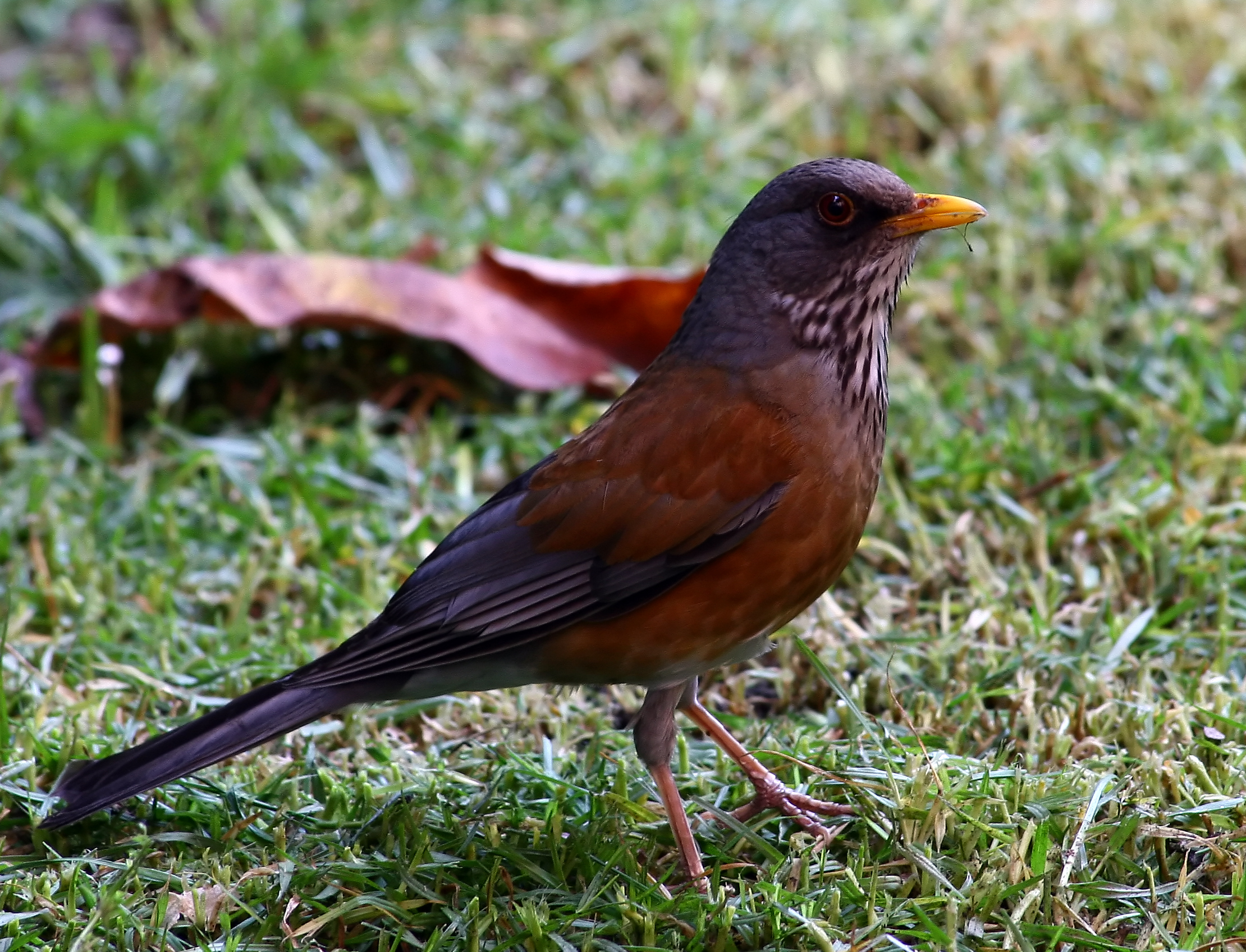 Turdus rufopalliatus, Rufous-backed Robin, Primavera huertera, turdidae